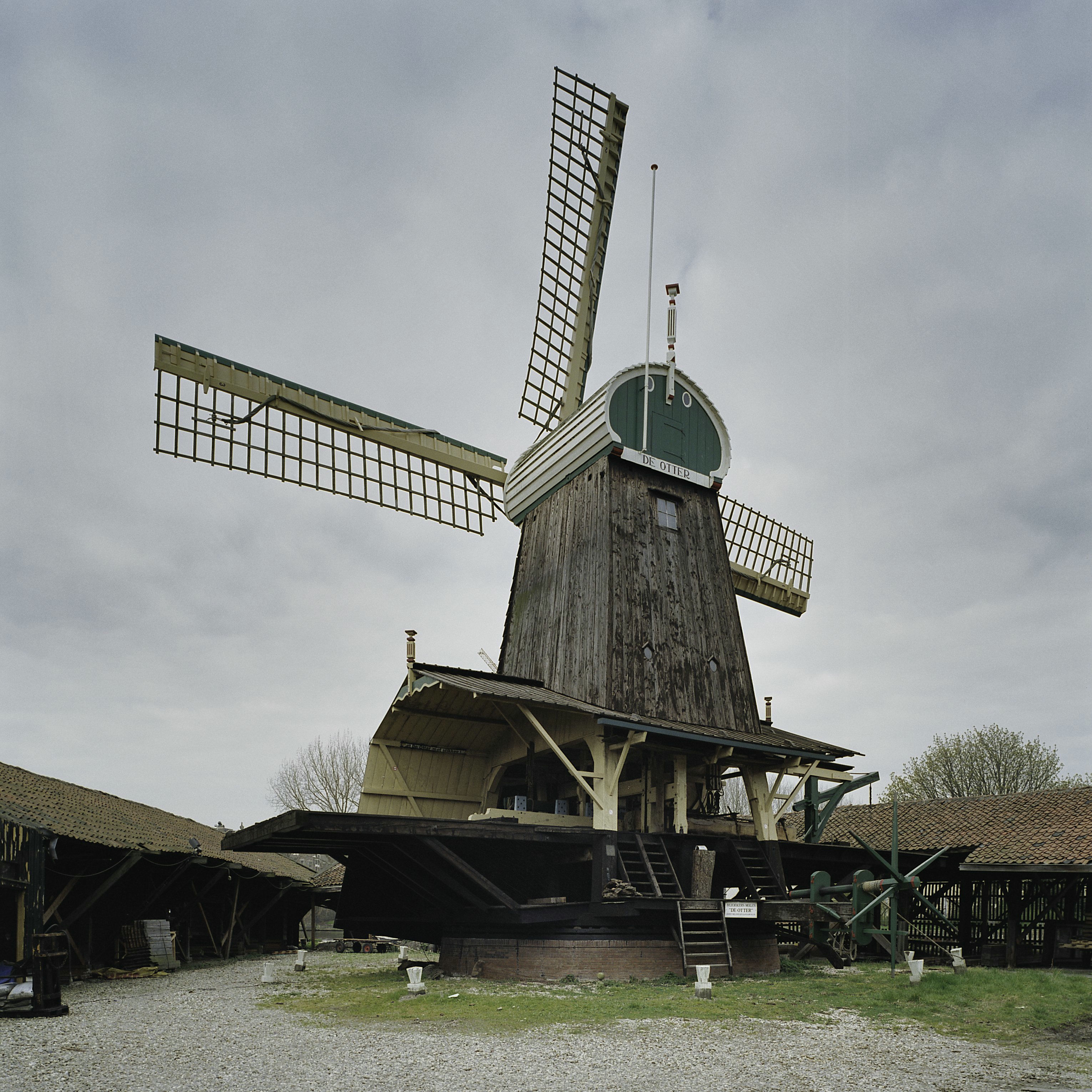 Molen De Otter: Achterzijde molen met enkele houtschuren (opmerking: Gefotografeerd voor Monumenten In Nederland Noord-Holland)